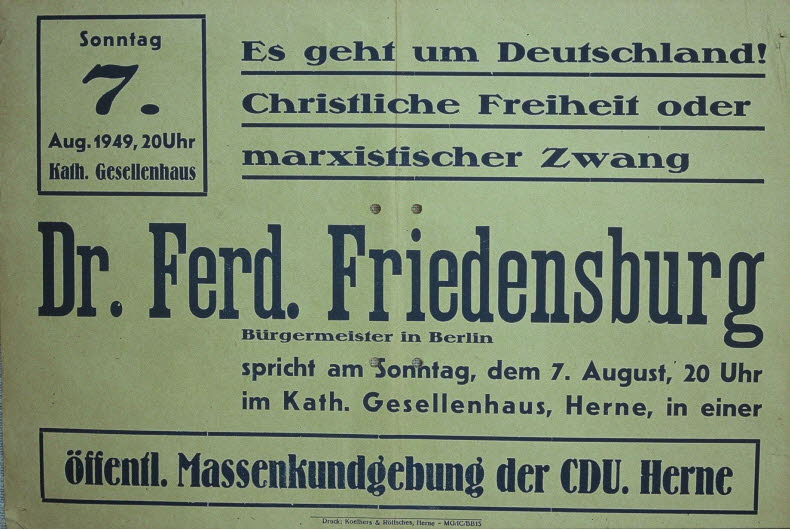 Ankündigungsplakat einer Veranstaltung mit Ferdinand Friedensburg, Christlich Demokratische Union Deutschlands